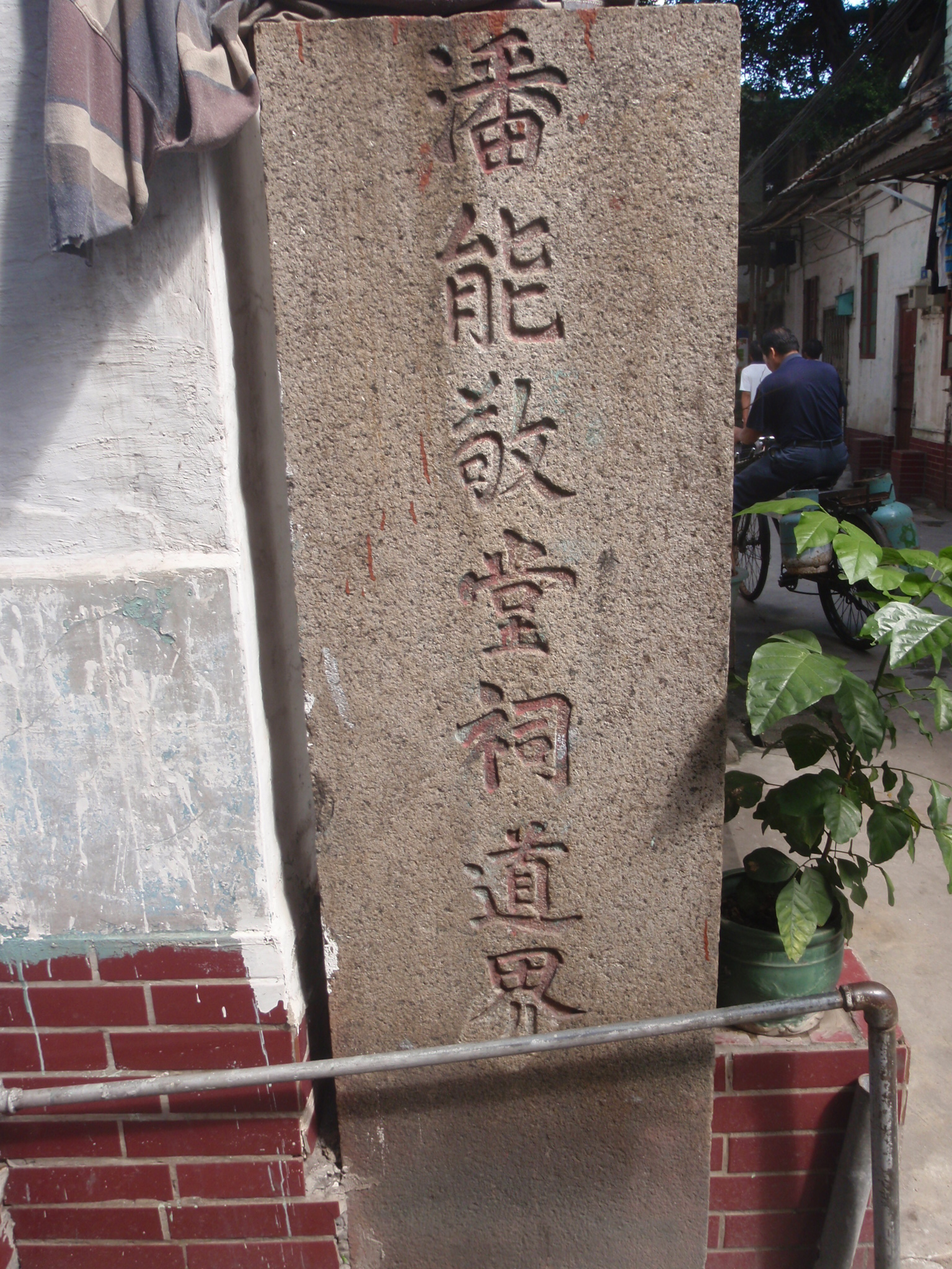 粵語: 廣州 潘能敬堂祠道界碑